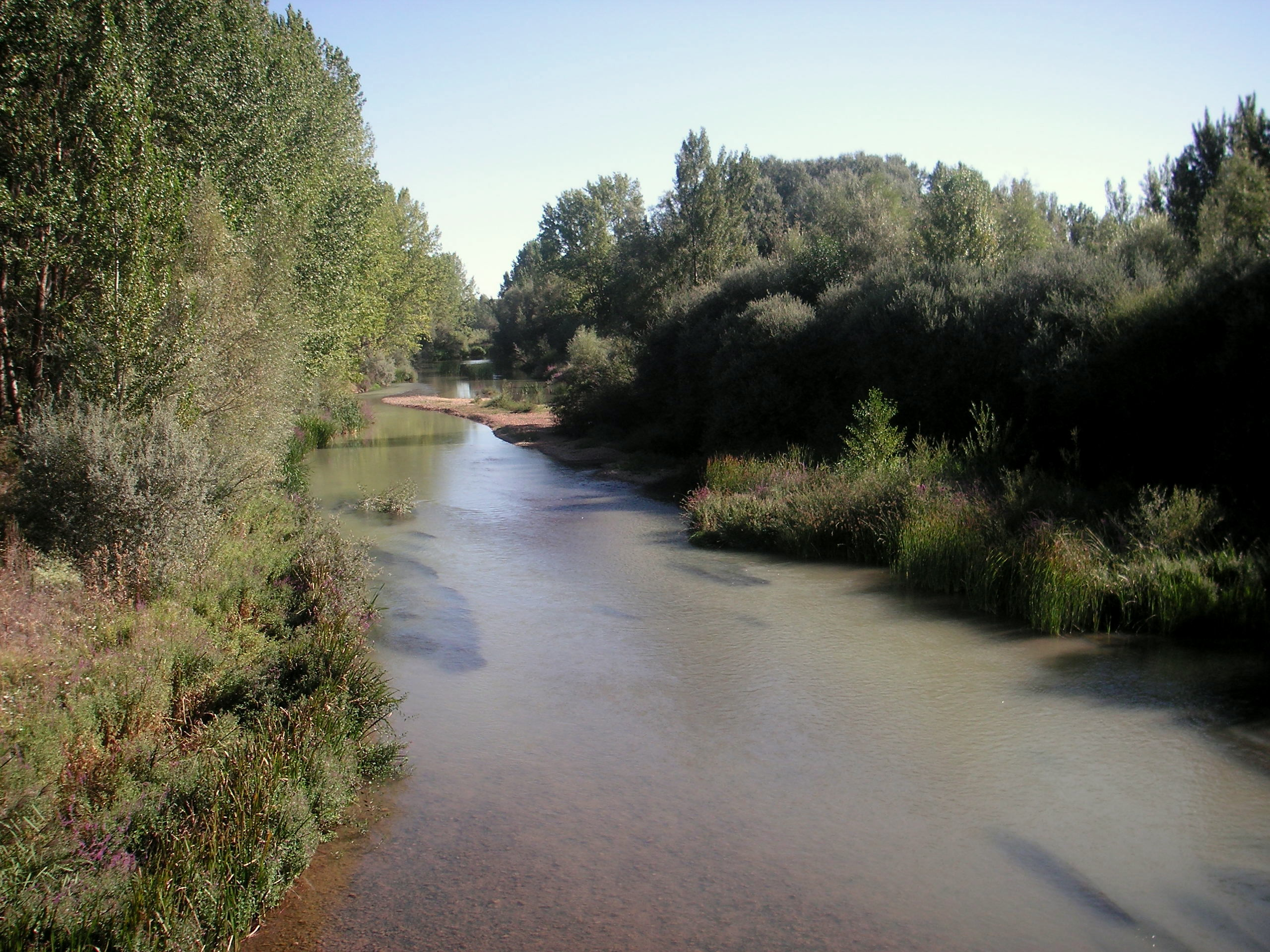 Río Cea a su paso por Melgar de Abajo, Valladolid (España)